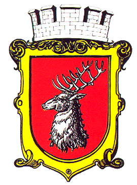 znak města Horní Jelení.